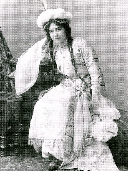 Евдокия Евгеньевна Урусова, ур. Салиас де Турнемир